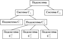 Пример иерархической структуры (блок схема)